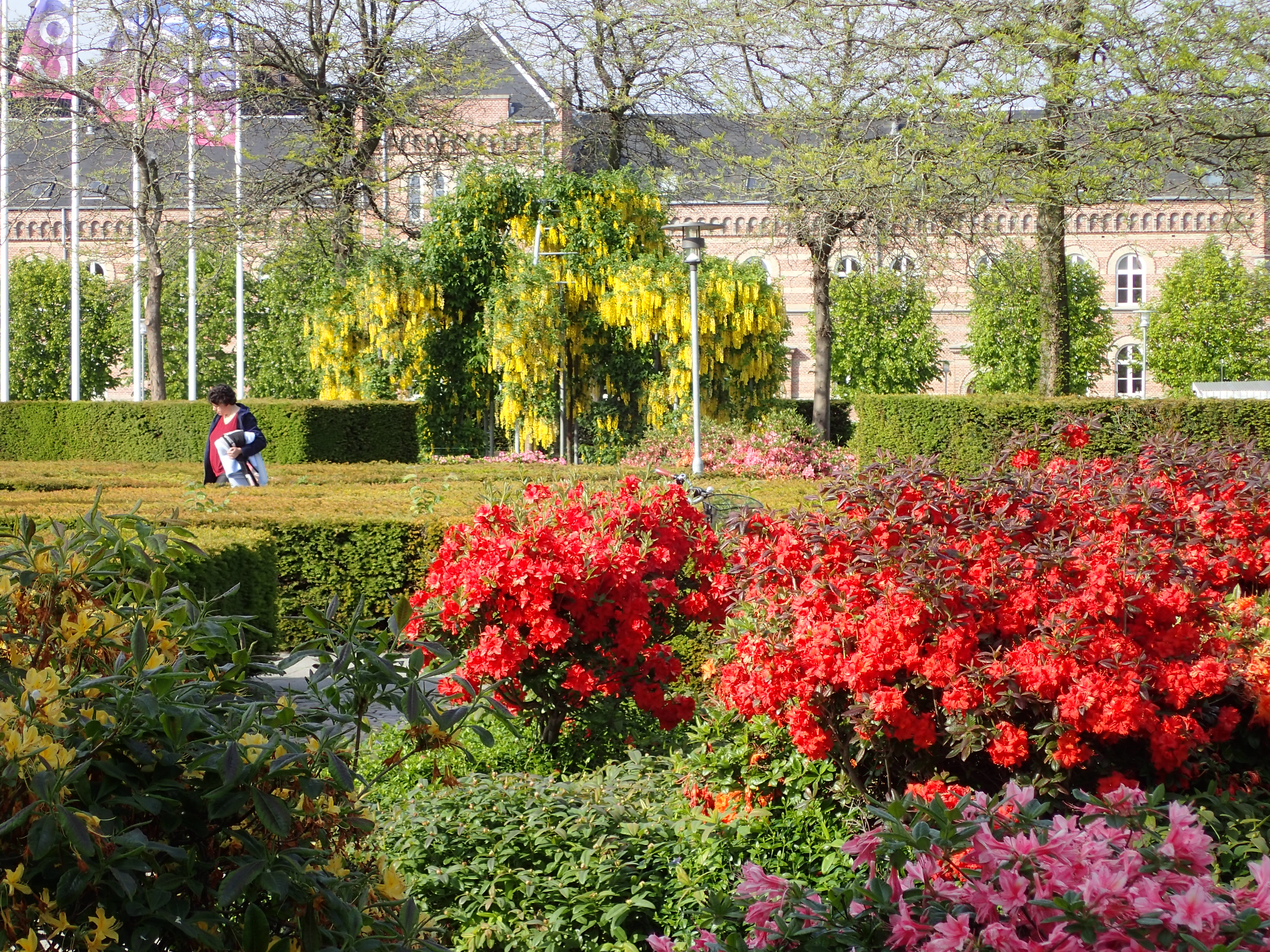 Musikhusparken i fuldt flor tidlig juni måned.